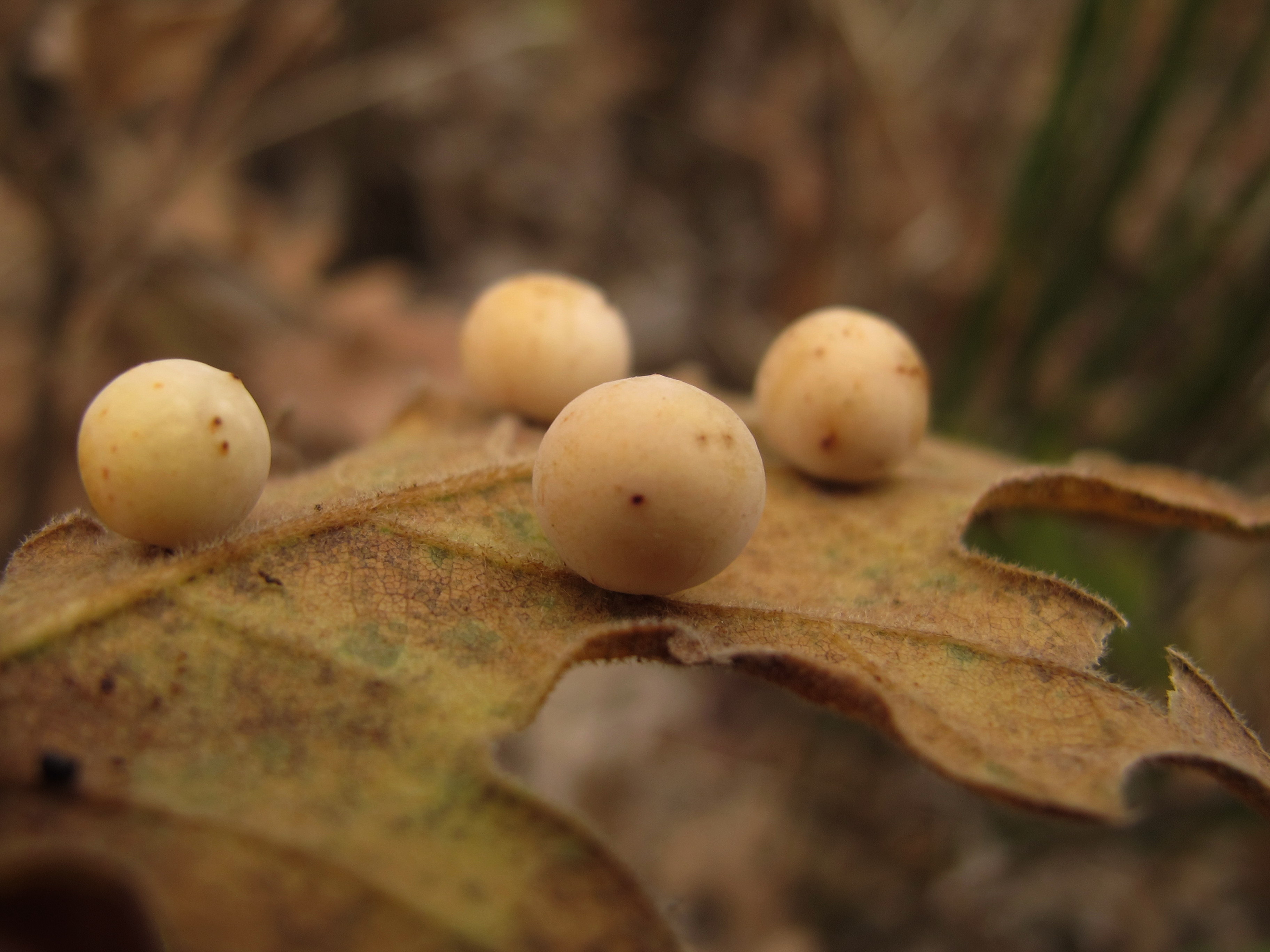 sobre quercus en las avispillas de las agallas hay una alternancia de generaciones anualmente con una a dos sexuales y una partenogénica . Este proceso diferencia a las varias generaciones en su apariencia y en la forma de inducir las gallaritas